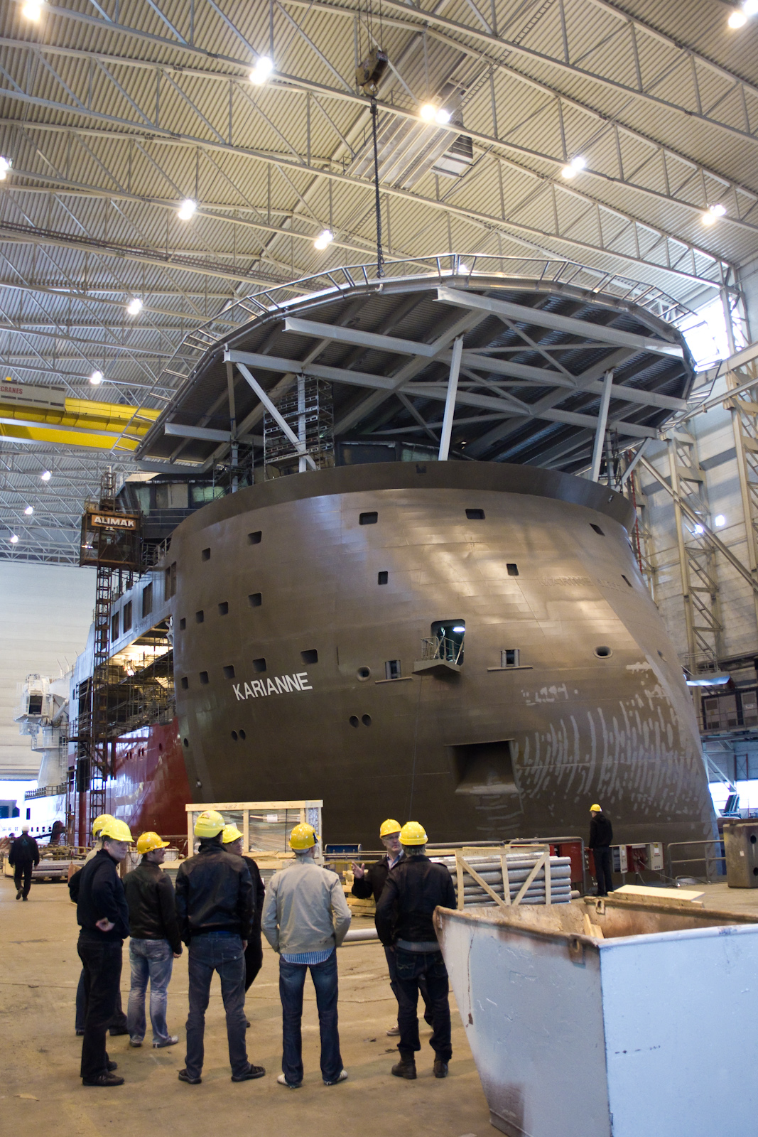 Karianne IMO 9460095